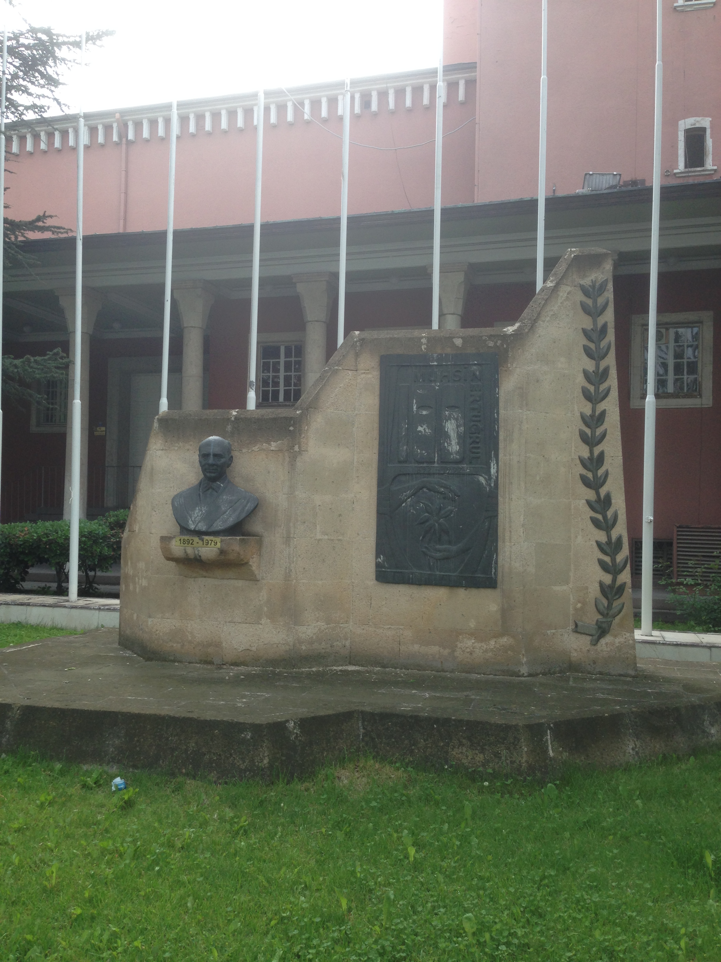 Muhsin Ertuğrul heykeli. Ulus, Ankara